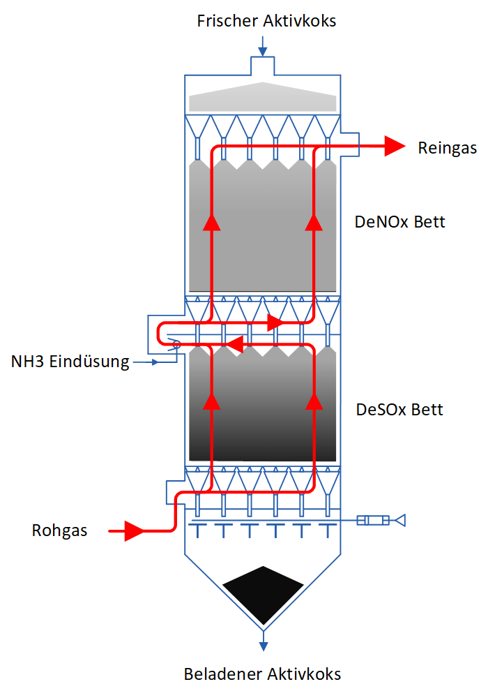 CSCR Adsorber schematisch